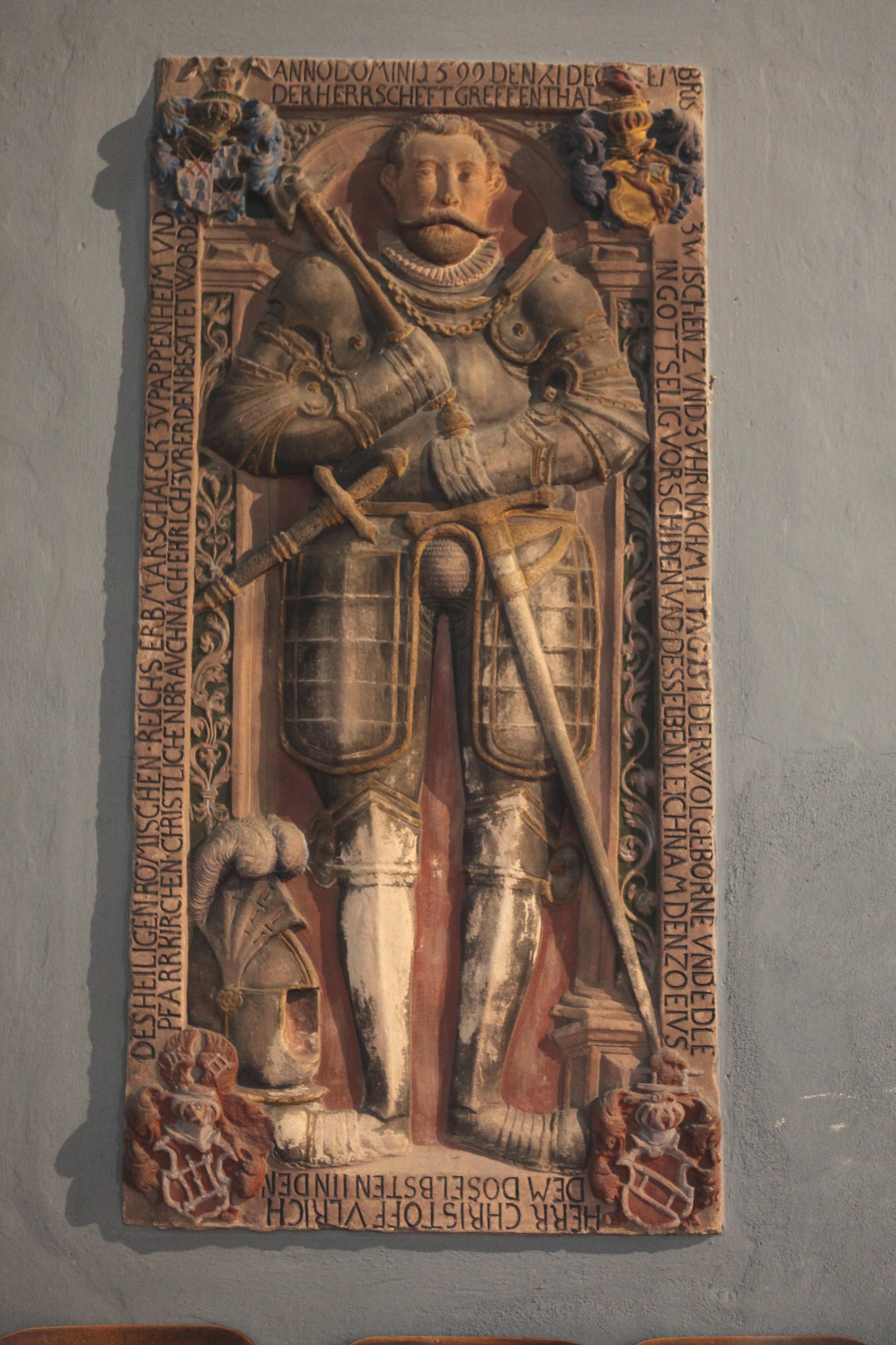 Epitaph des Christoff Ulrich (* 1546; † 11. Dezember 1599) von Pappenheim in St. Marien in Gräfenthal